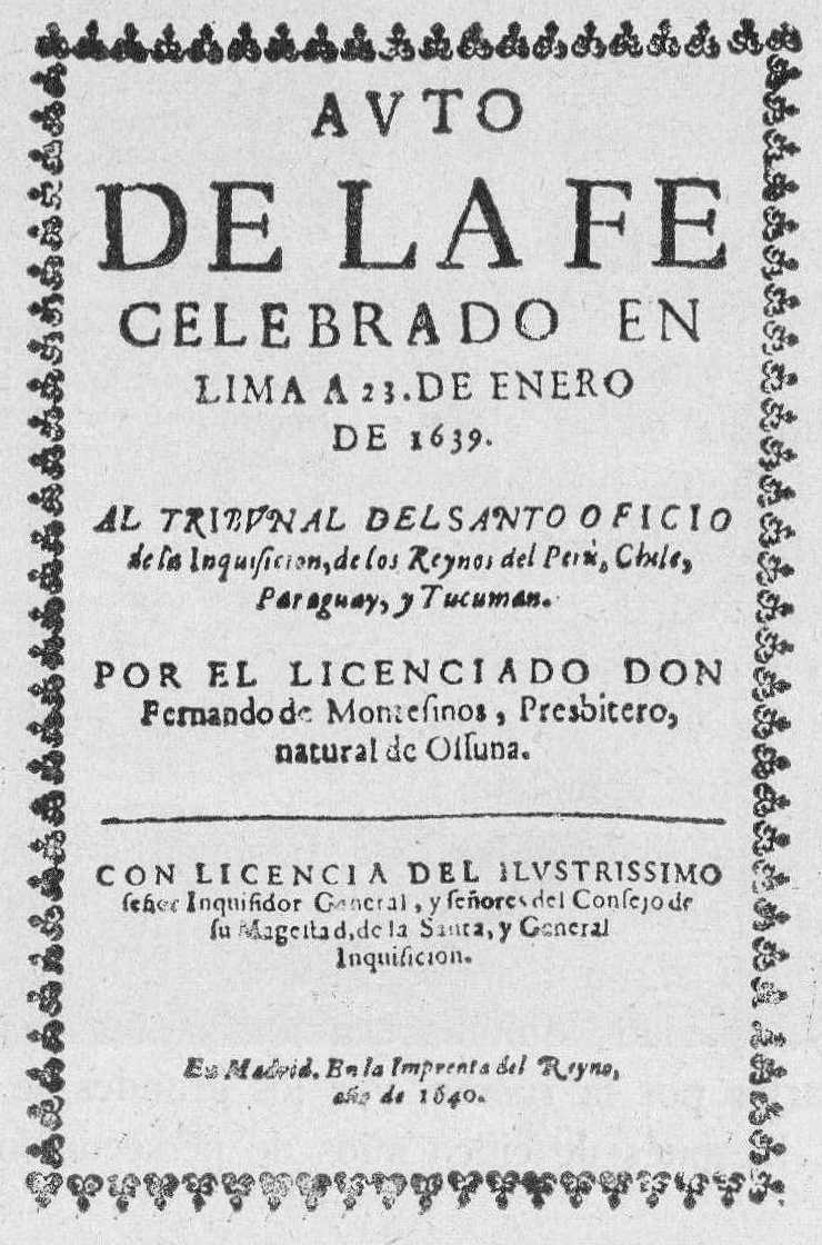 Anuncio de un Auto de la Fe en Lima el 23 de enero de 1639 (impreso en Madrid, en la Imprenta del Reyno, 1640).